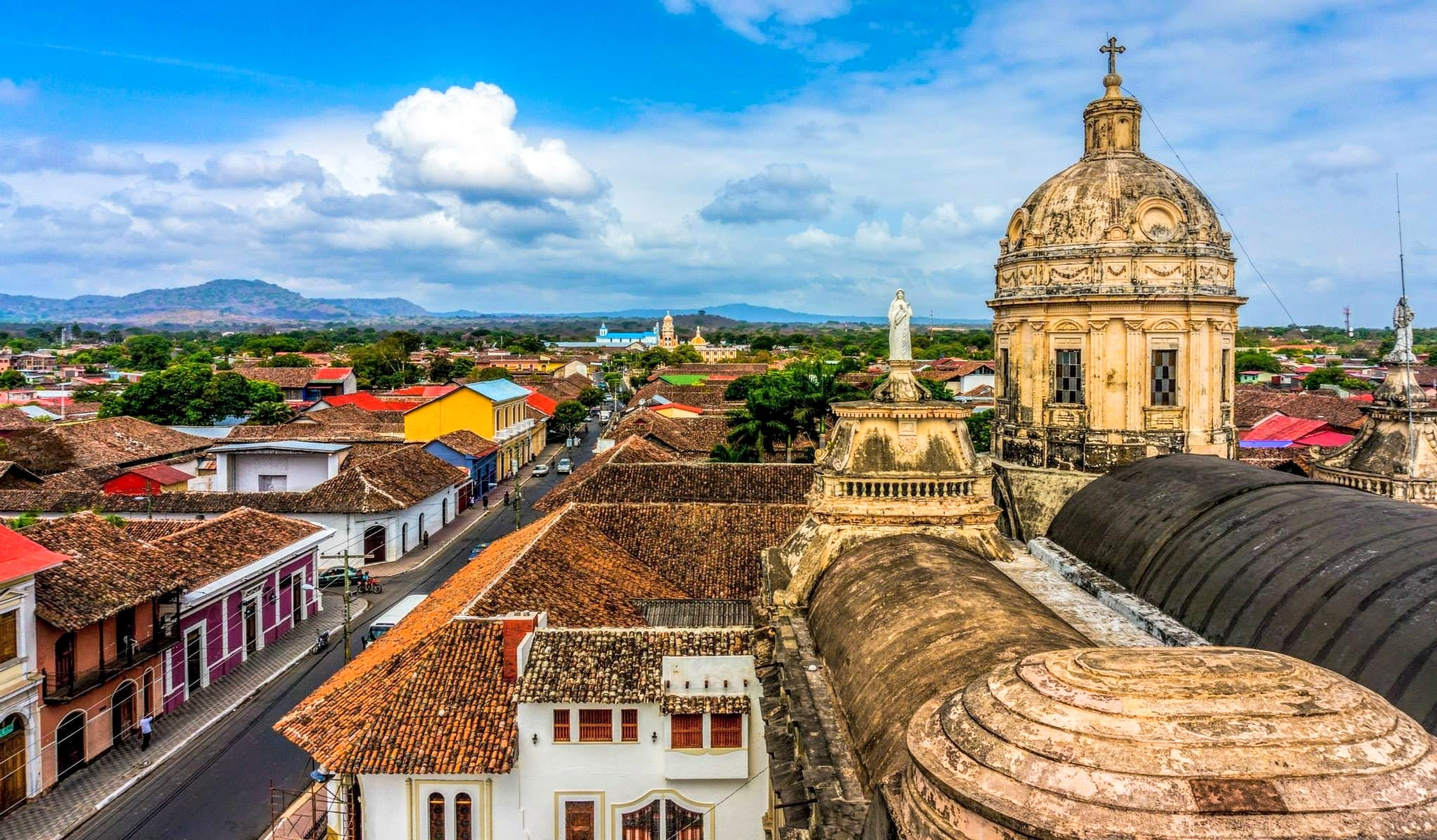 Ciudad de Granada en Nicaragua.